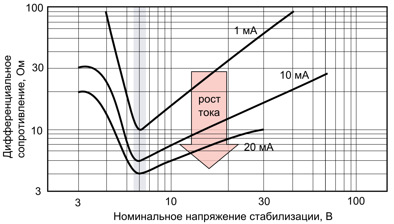 Зависимость дифф. сопротивления стабилитрона от напряжения стабилизации (для приборов сопоставимой мощности)